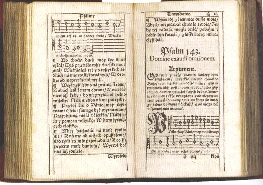 Катехизис